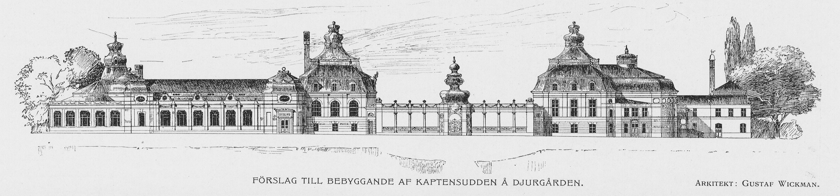 Förslag till bebyggande av Kaptensudden (ej utfört)